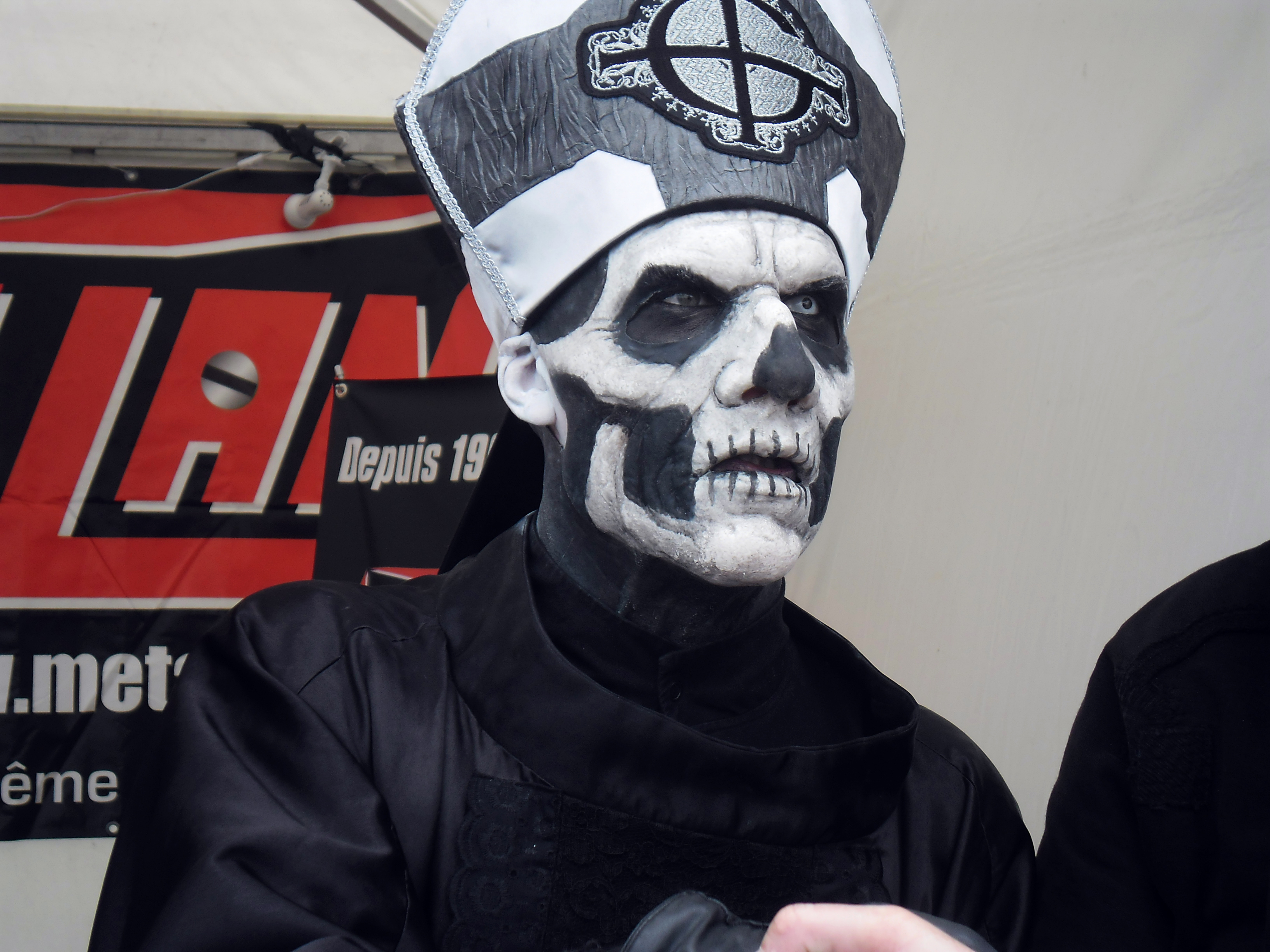 Ghost en dédicace au Hellfest 2013